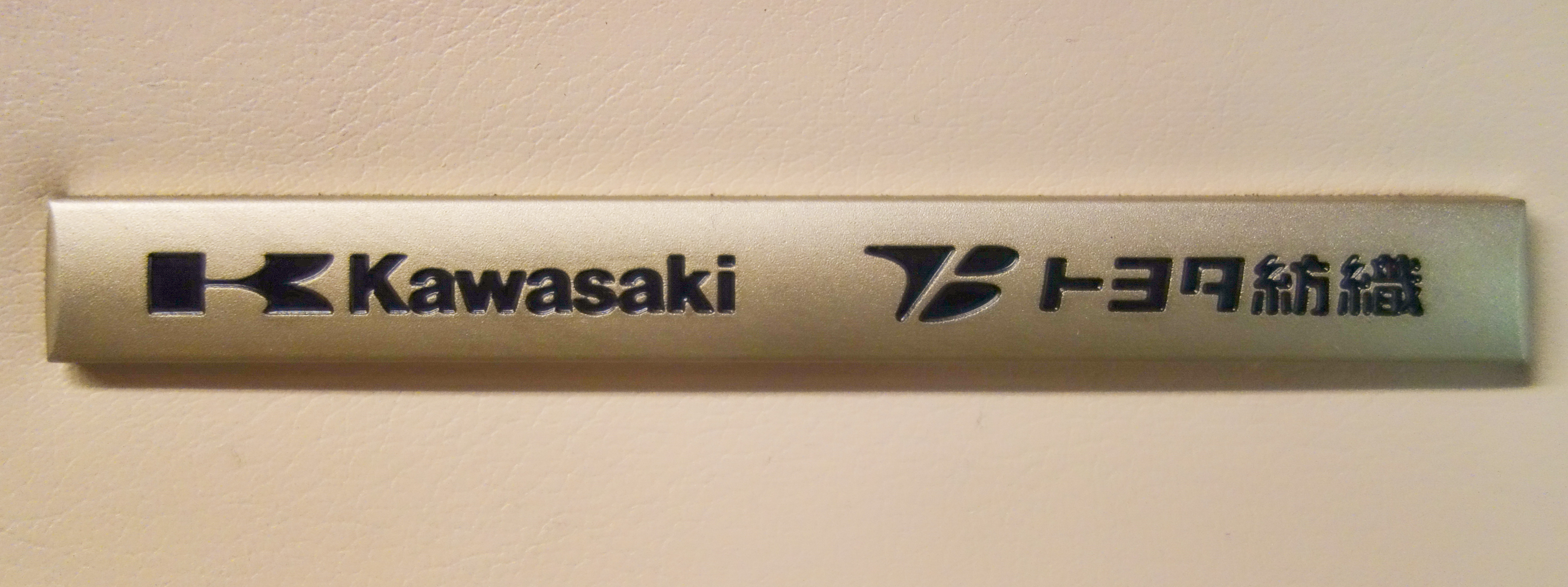 E7系・グランクラス座席 製造者エンブレム（背もたれ裏側）